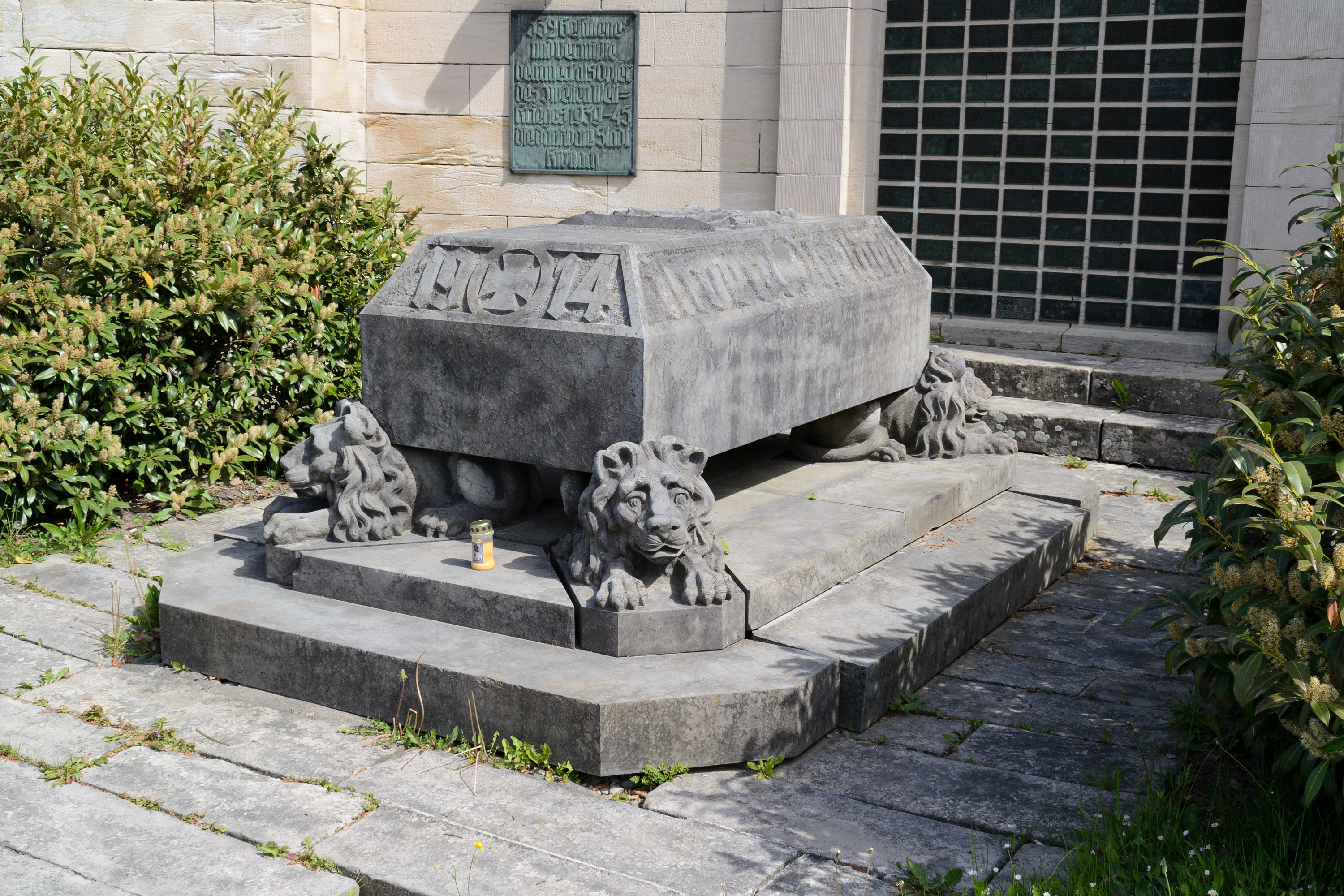 Ehrenmal am Fuß der Festung Rosenberg in Kronach für die Gefallenen der beiden Weltkriege.